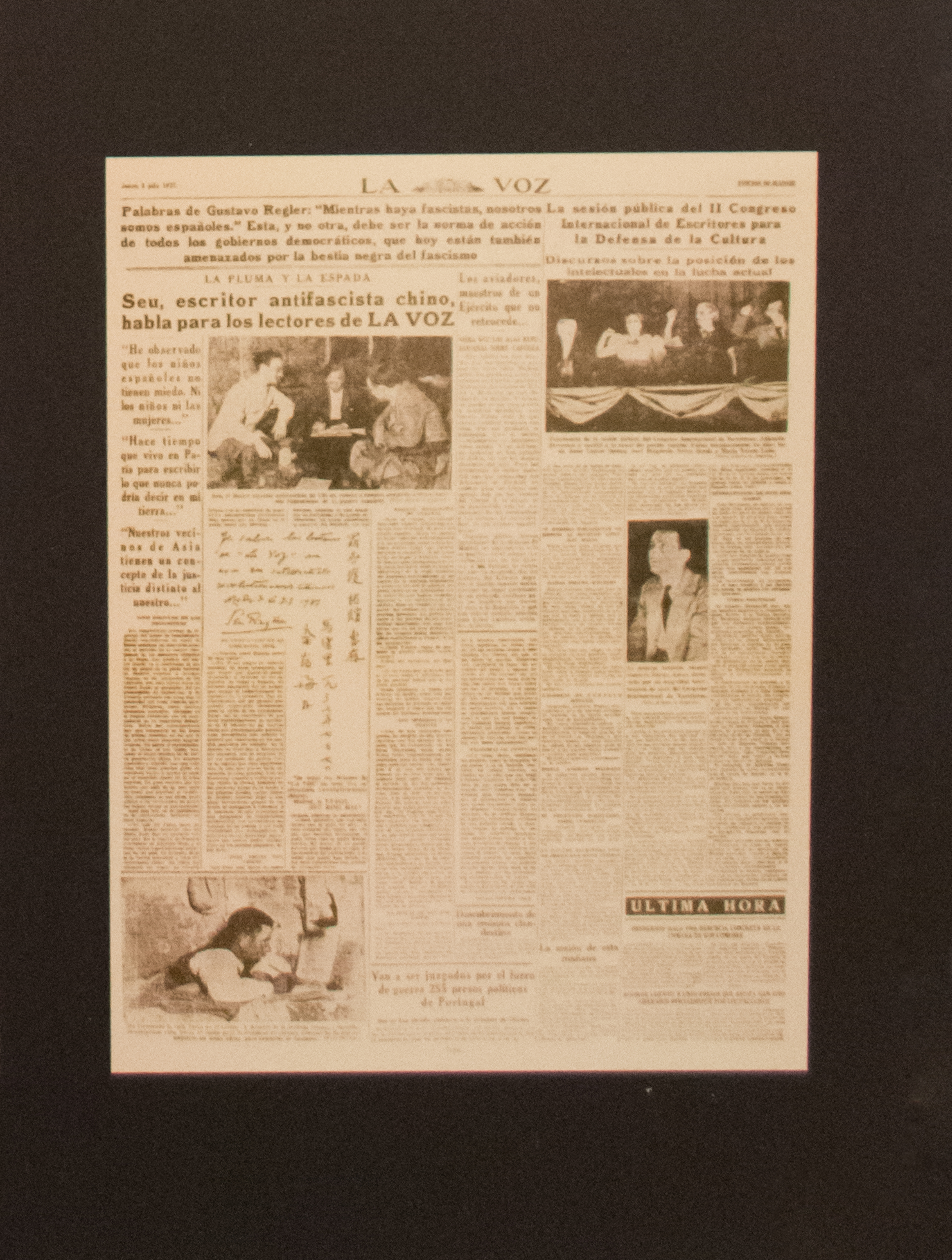 Diario la Voz: Noticia sobre el Segundo Congreso Internacional de Escritores para la Defensa de la Cultura. Exposición Por la defensa de la Cultura en el Centro del Carmen de Valencia.